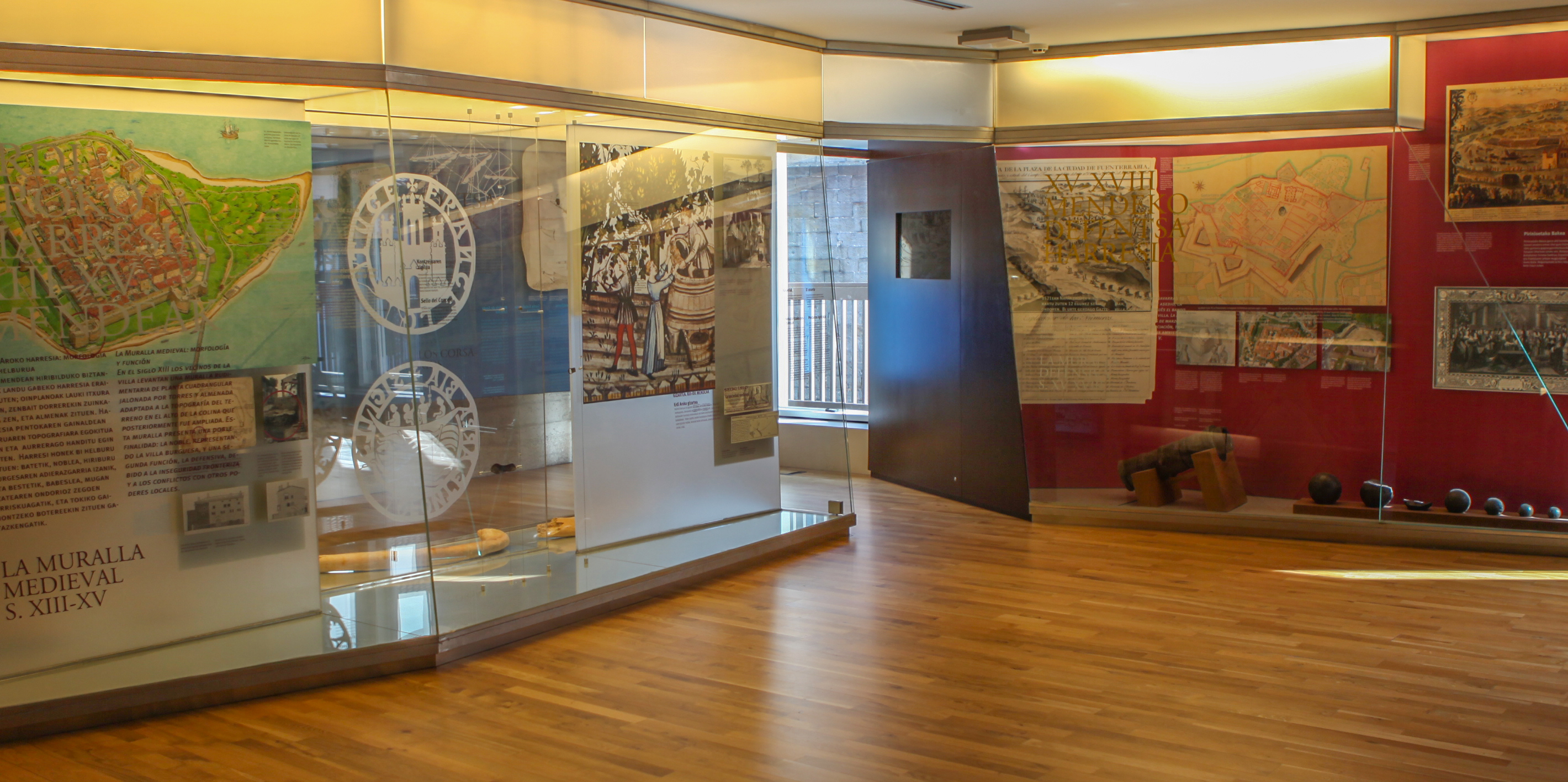 Centro de interpretación de las Murallas de Hondarribia (Arma Plaza Fundazioa). Espacio expositivo donde se proporciona información sobr el patrimonio cultural de Hondarribia, especialmente el referido a sus fortificaciones. En el mismo espacio posee una oficina de turismo y una sala polivalente para proyecciones de documentales y montaje de exposiciones temorales